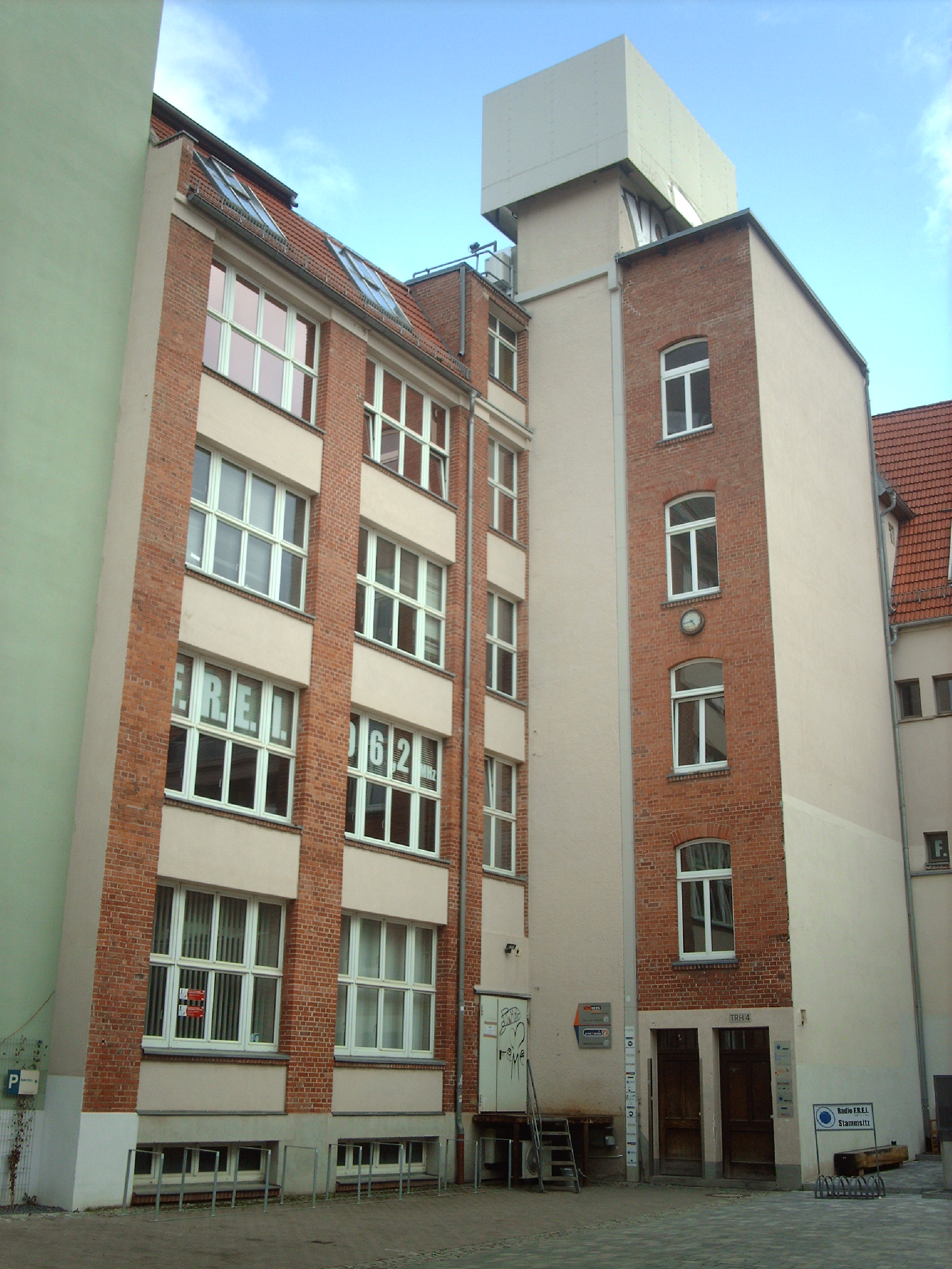 Sitz von Radio F.R.E.I. in der Gotthardtstraße 21 in Erfurt.